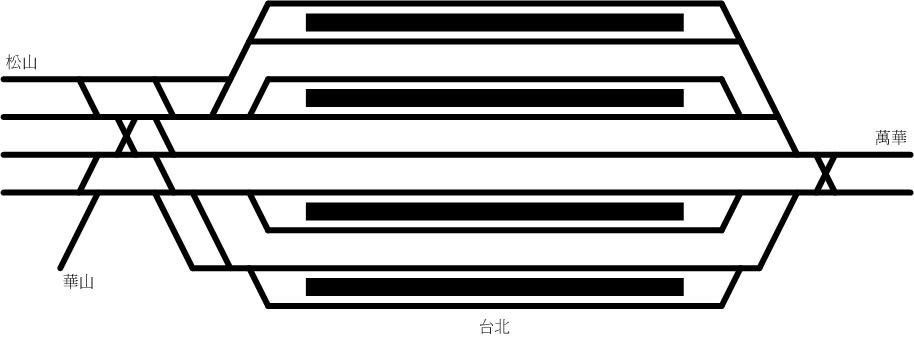 台北車站軌道圖（台鐵四月台時期），使用 Microsoft Visio 繪製。